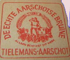 Oud bierkaartje - Brouwerij Tielemans - Aarschot - Vlaams Brabant - België